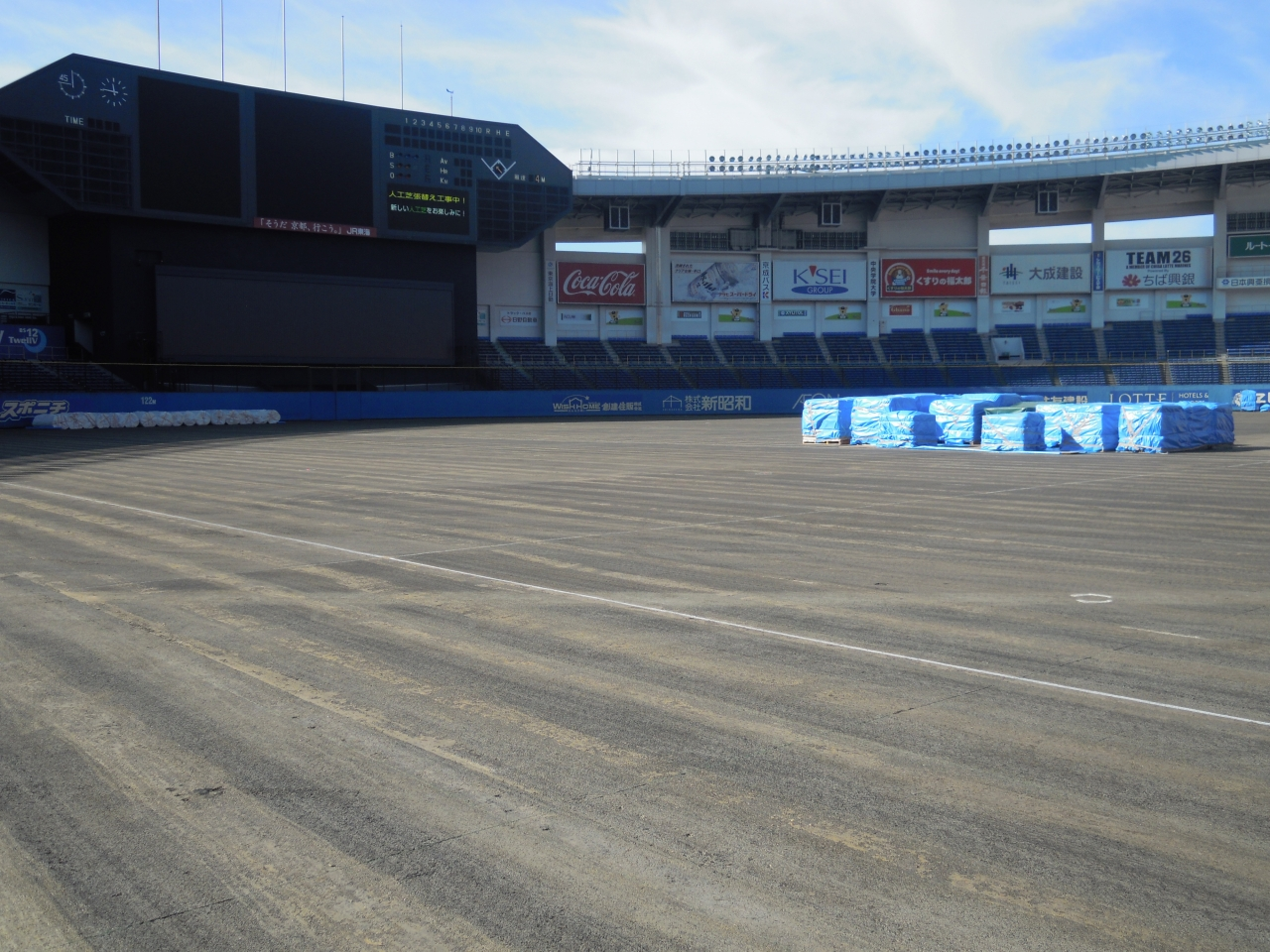 ＱＶＣマリンフィールド(千葉マリンスタジアム)の芝貼り替え工事 2011年1月撮影